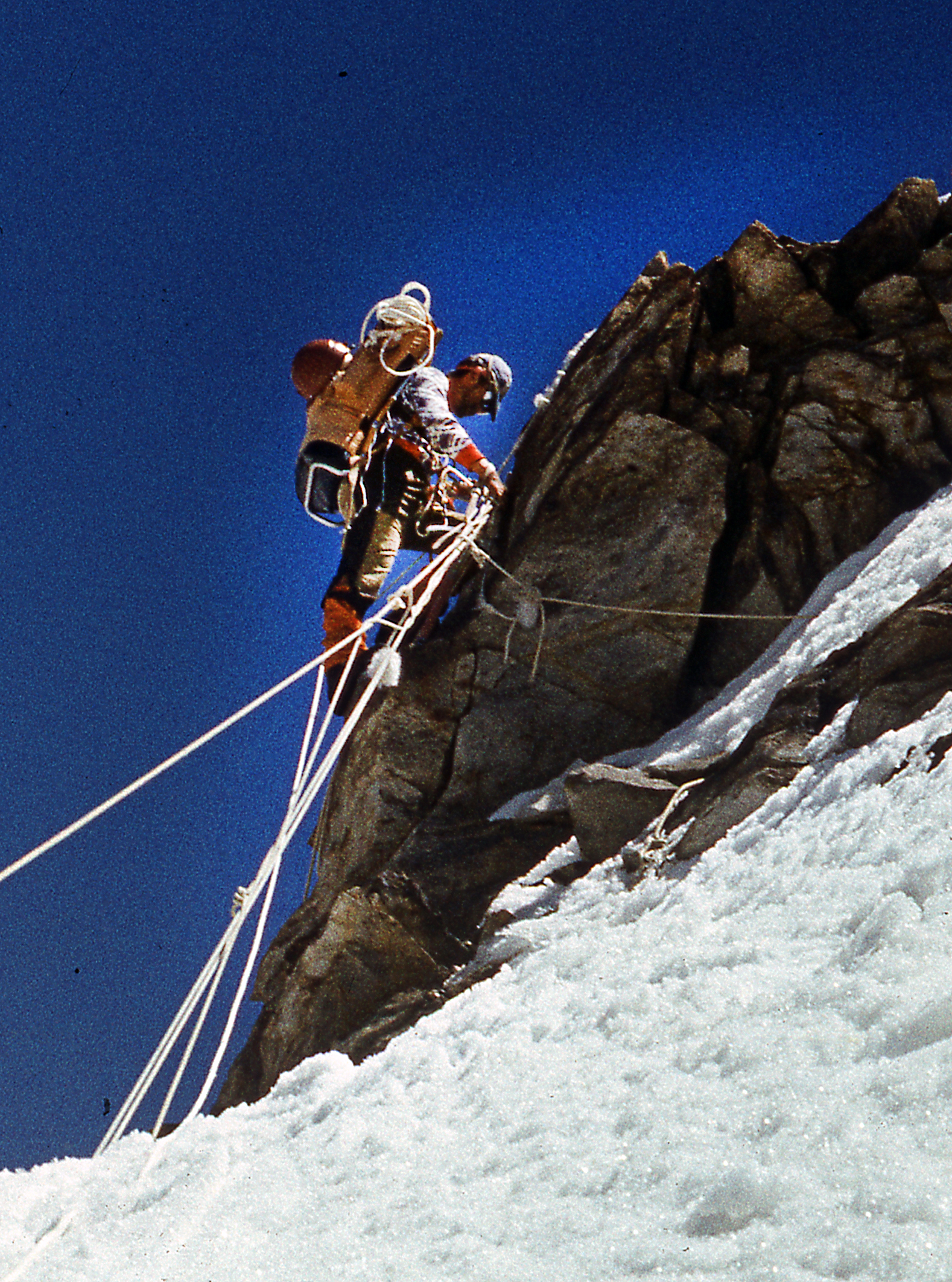 Alfred Lõhmus